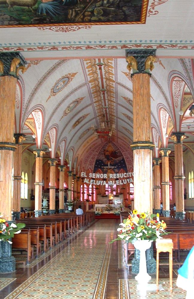 Interior of Iglesia de San Rafael, Zarcero, Costa Rica